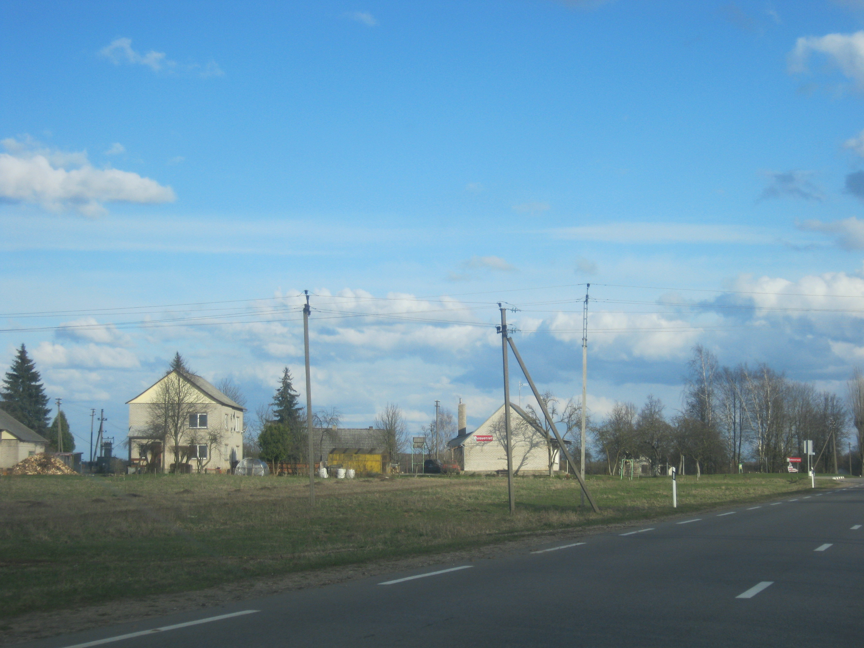 Pasraučiai